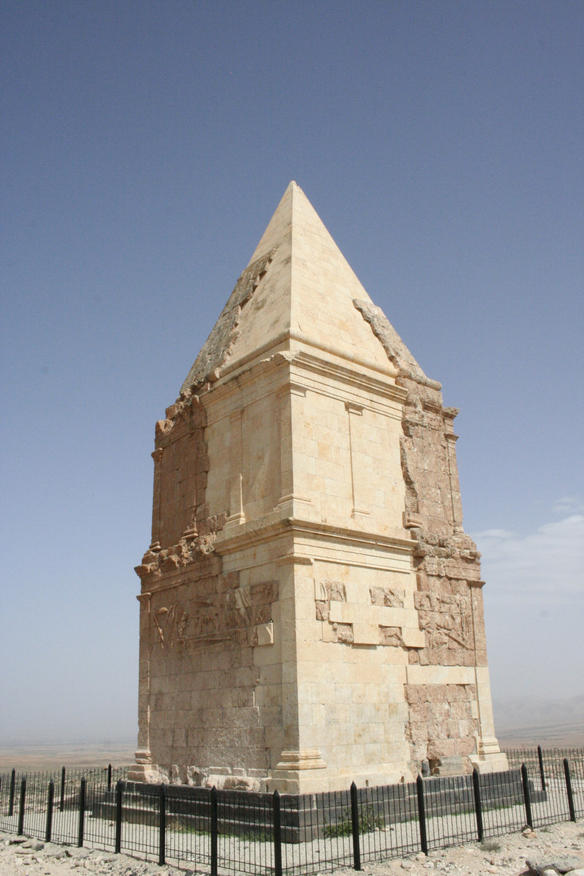 Hermel Pyramid